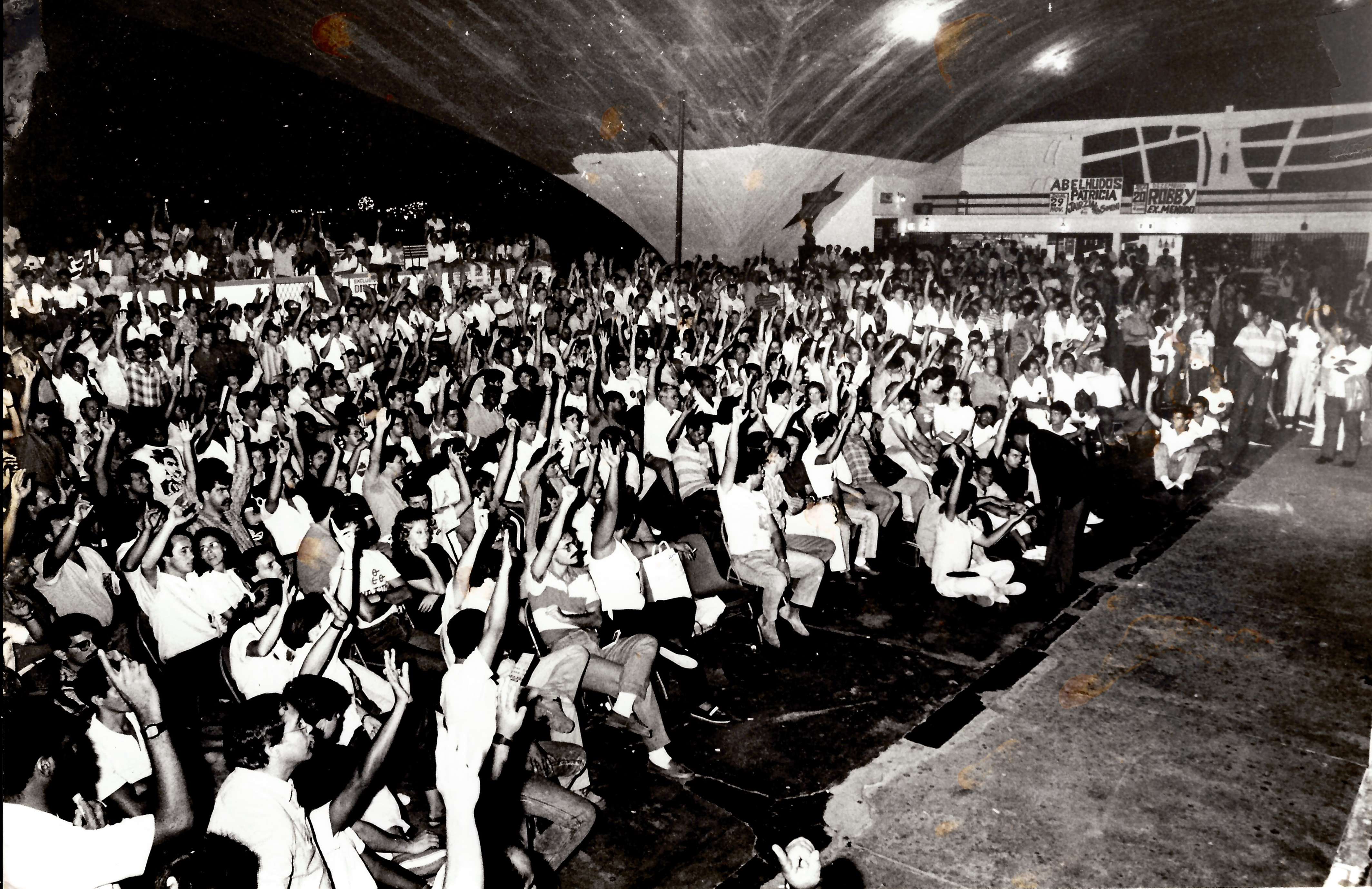 A fotografia é um registro de uma das assembleias pela CCT, que reuniu aeronautas e aeroviários no Estádio Luso-Brasileiro localizado na Ilha do Governador - RJ, no ano de 1987.